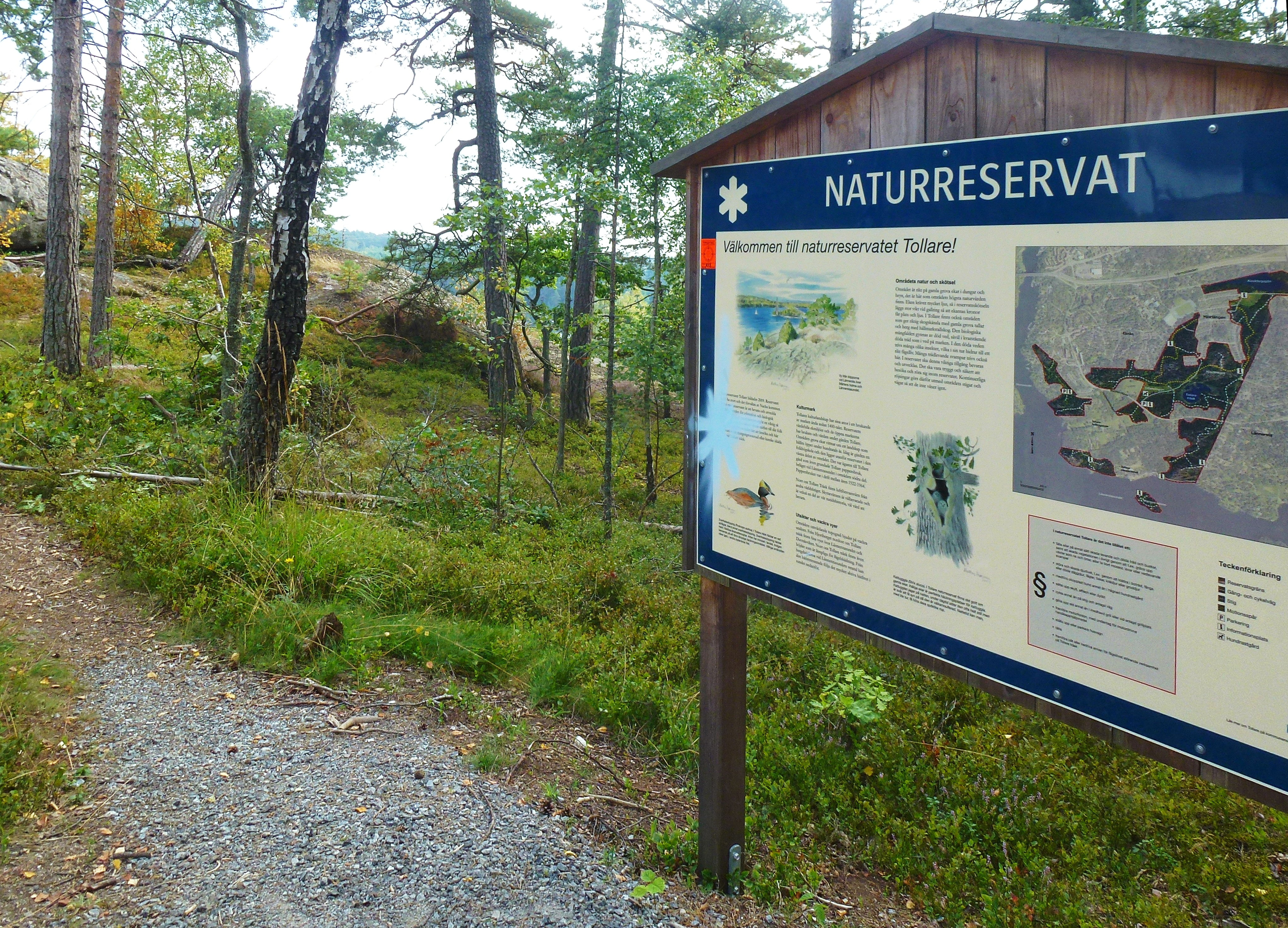 Tollare naturreservat, infotavla